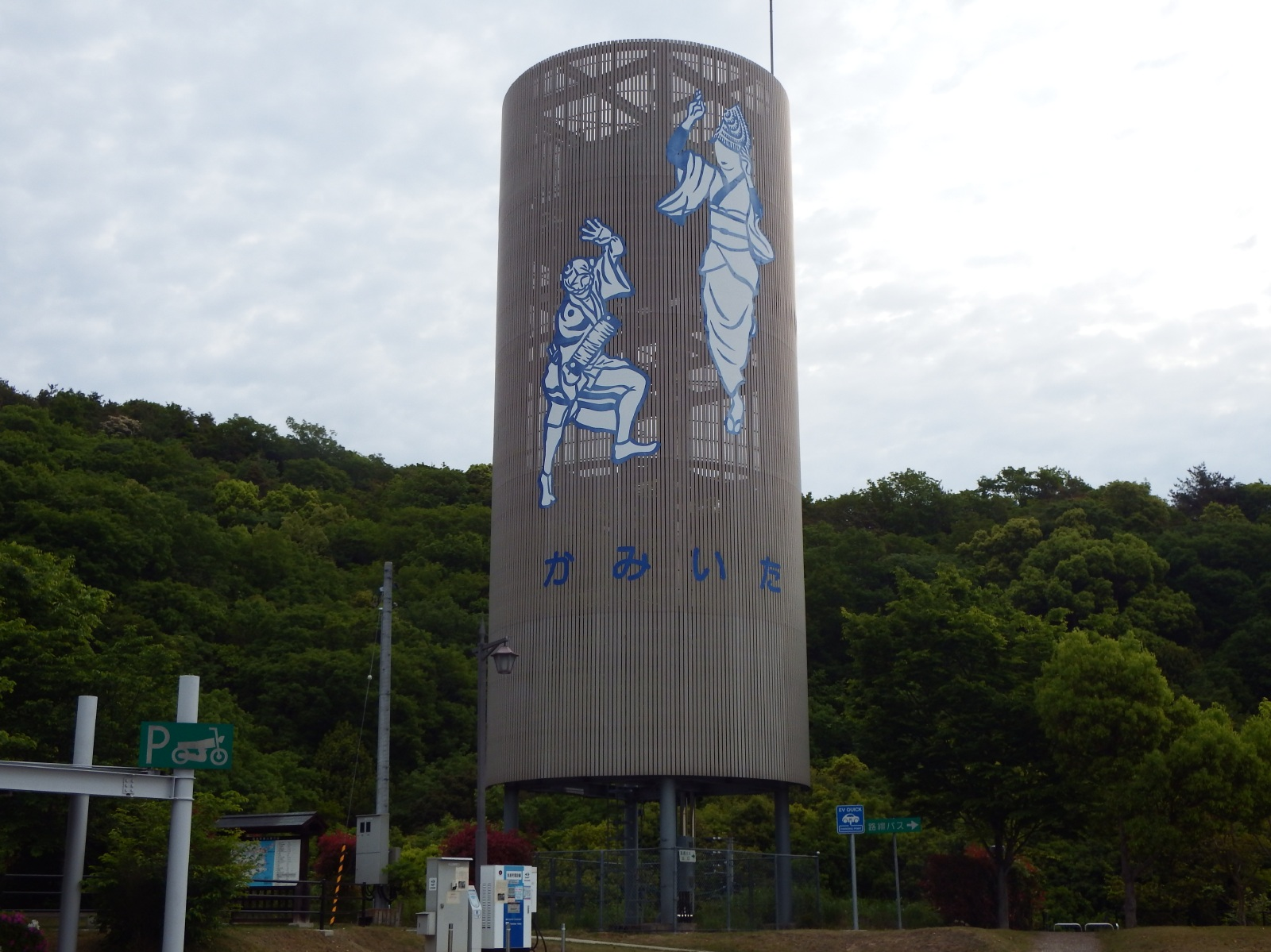 上板サービスエリアのモニュメント